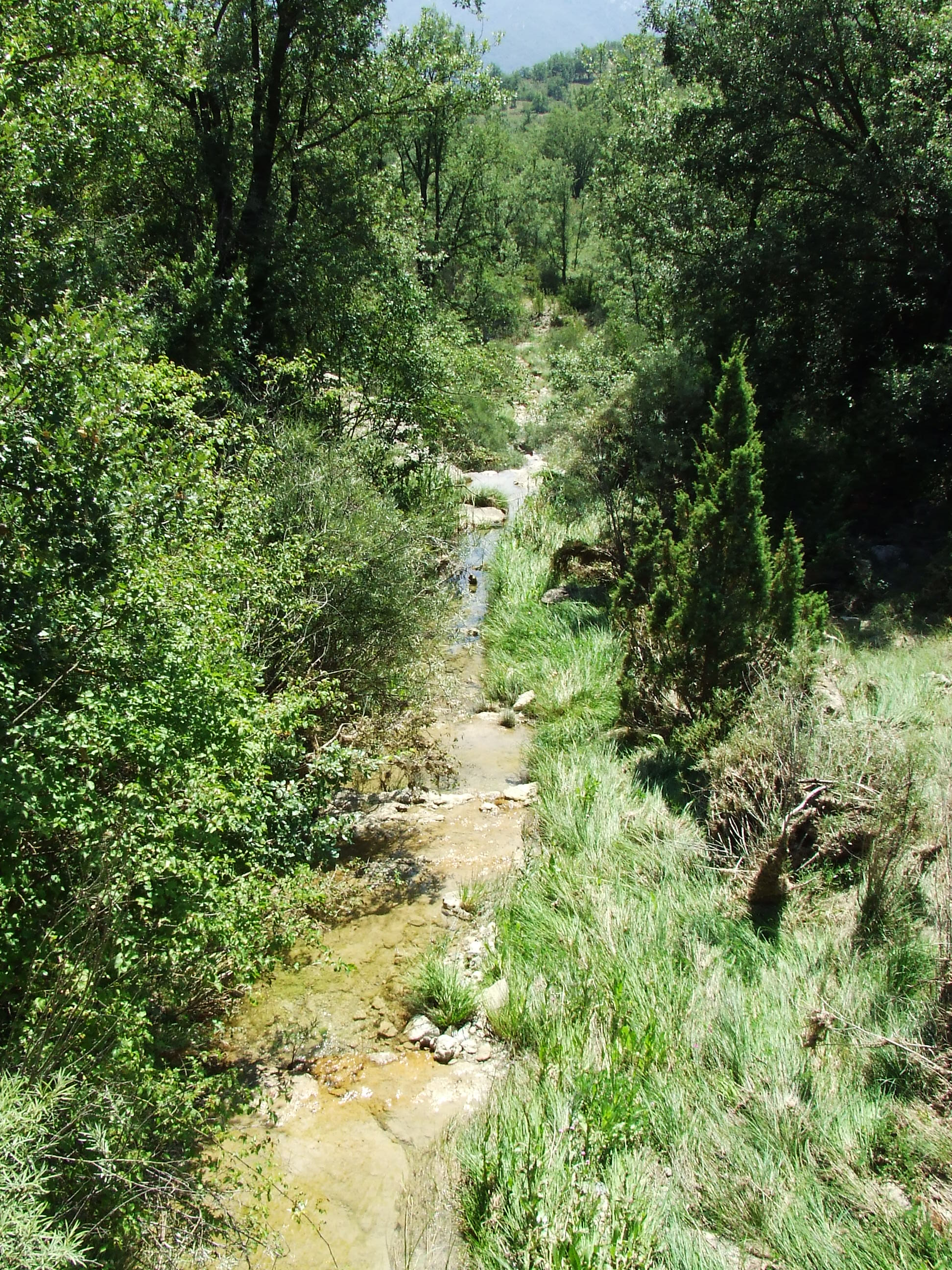 Barranc de la Mulla (Sant Esteve de la Sarga, Pallars Jussà)